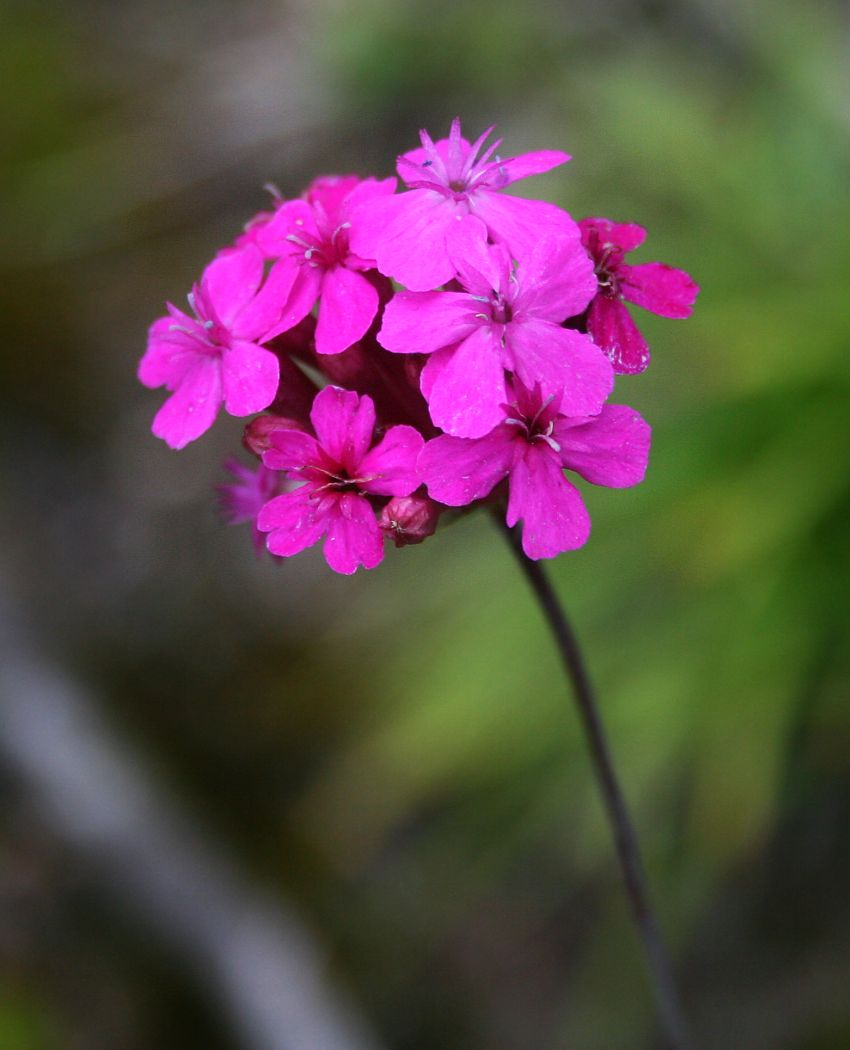 Silene armeria (= Atocion armeria), Nelkengewächse (Caryophyllaceae) – Georgien/საქართველო: Kleiner Kaukasus, zwischen Didi Mitarbi und Patara Mitarbi, ENE Bakuriani/ბაკურიანი, ca. 1410 m s.m.